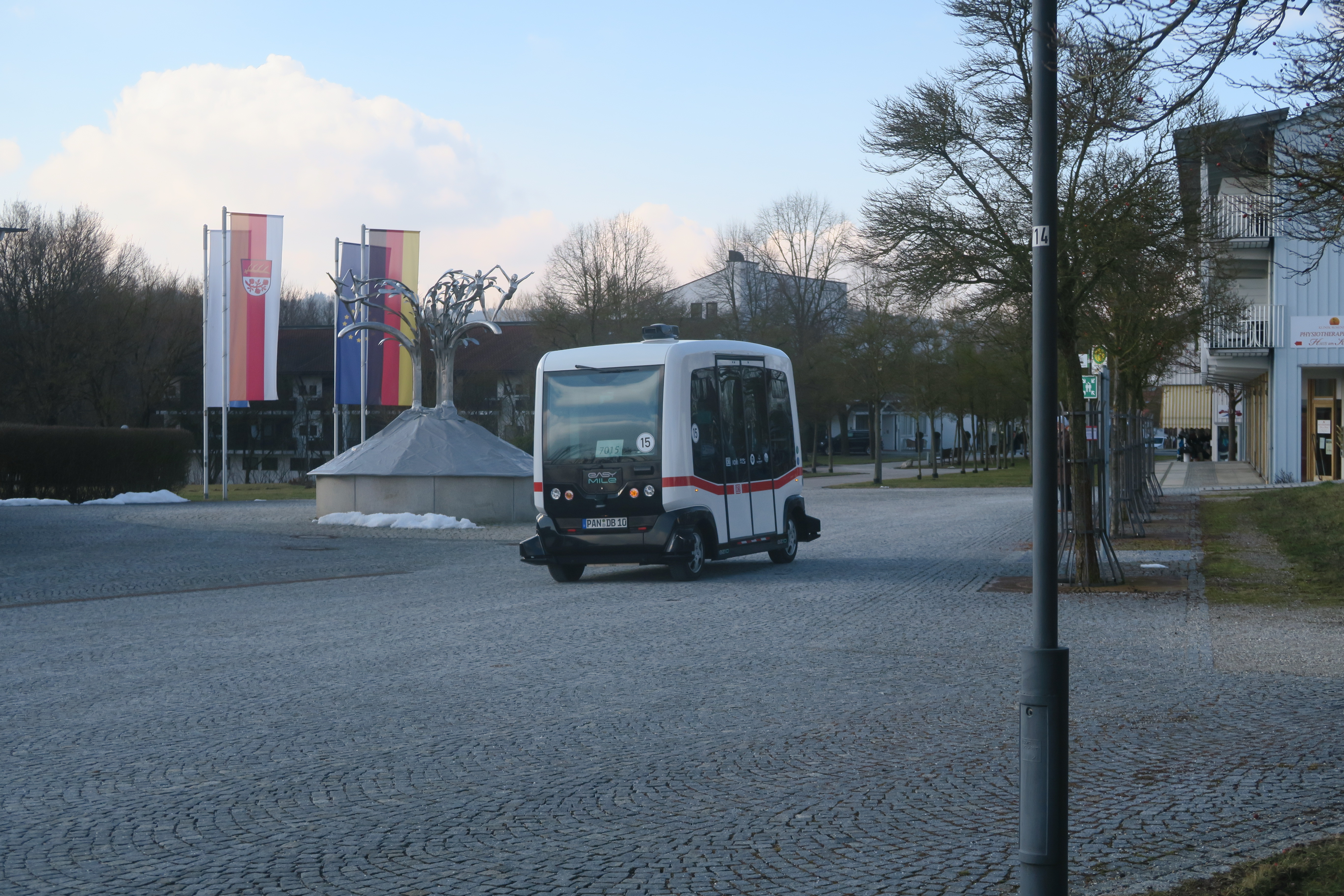 Autonomes Fahrzeug Bad Birnbach